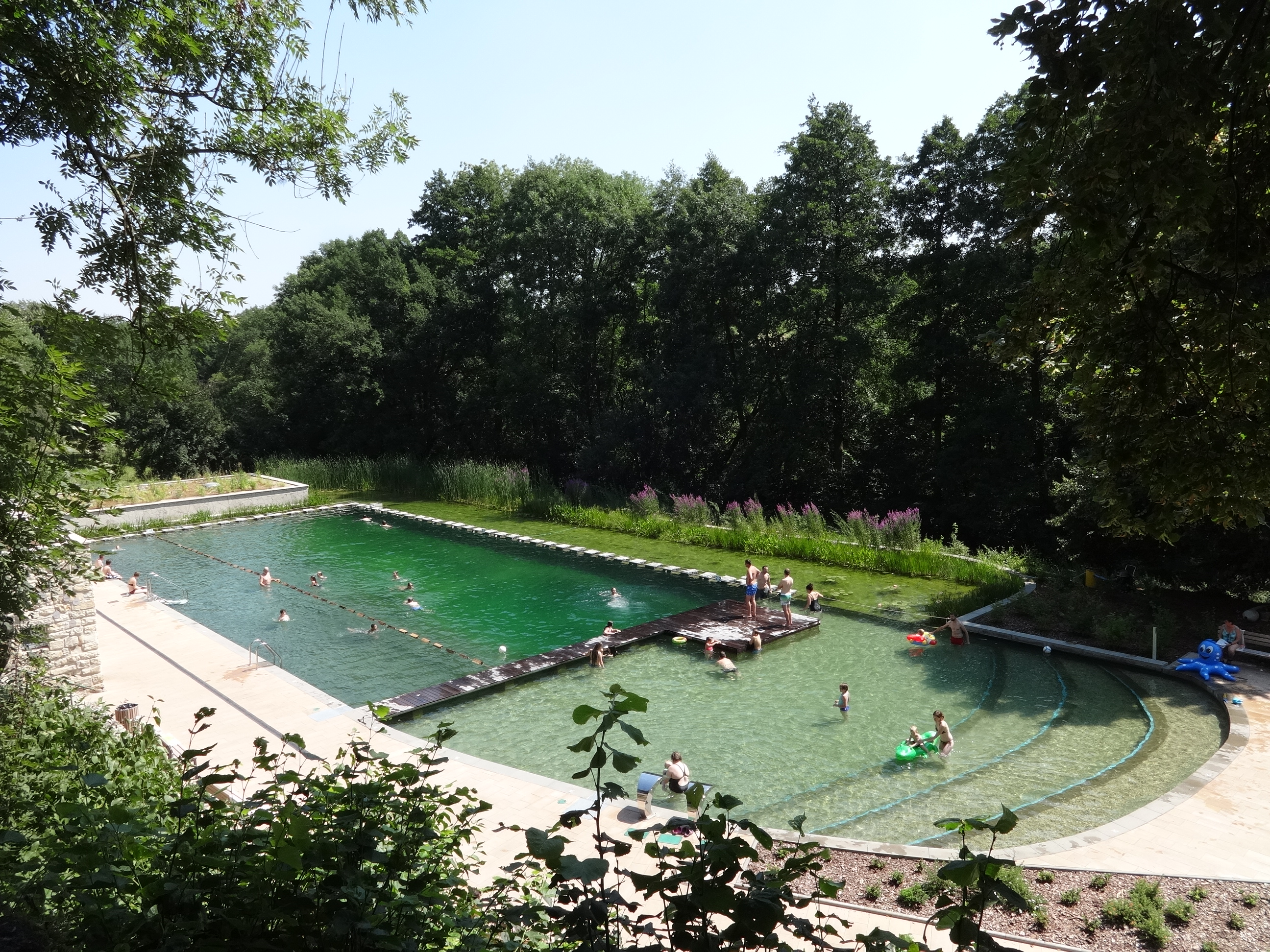 Das Zschonergrundbad im Dresdner Zschonergrund